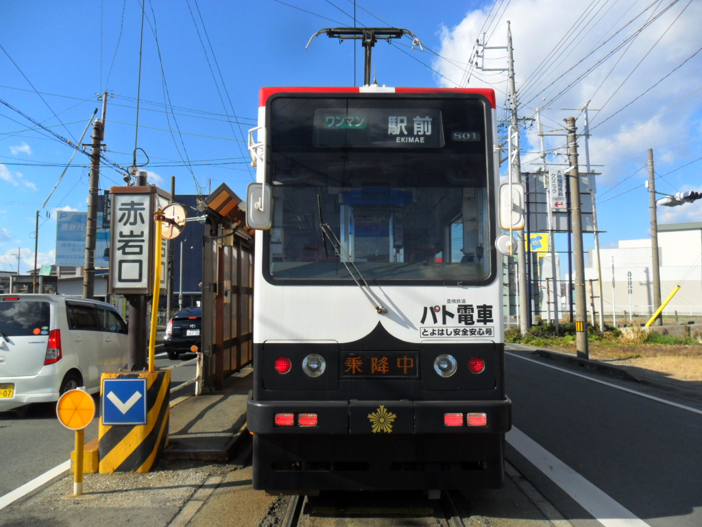 豊橋鉄道モ800形 2015年1月撮影